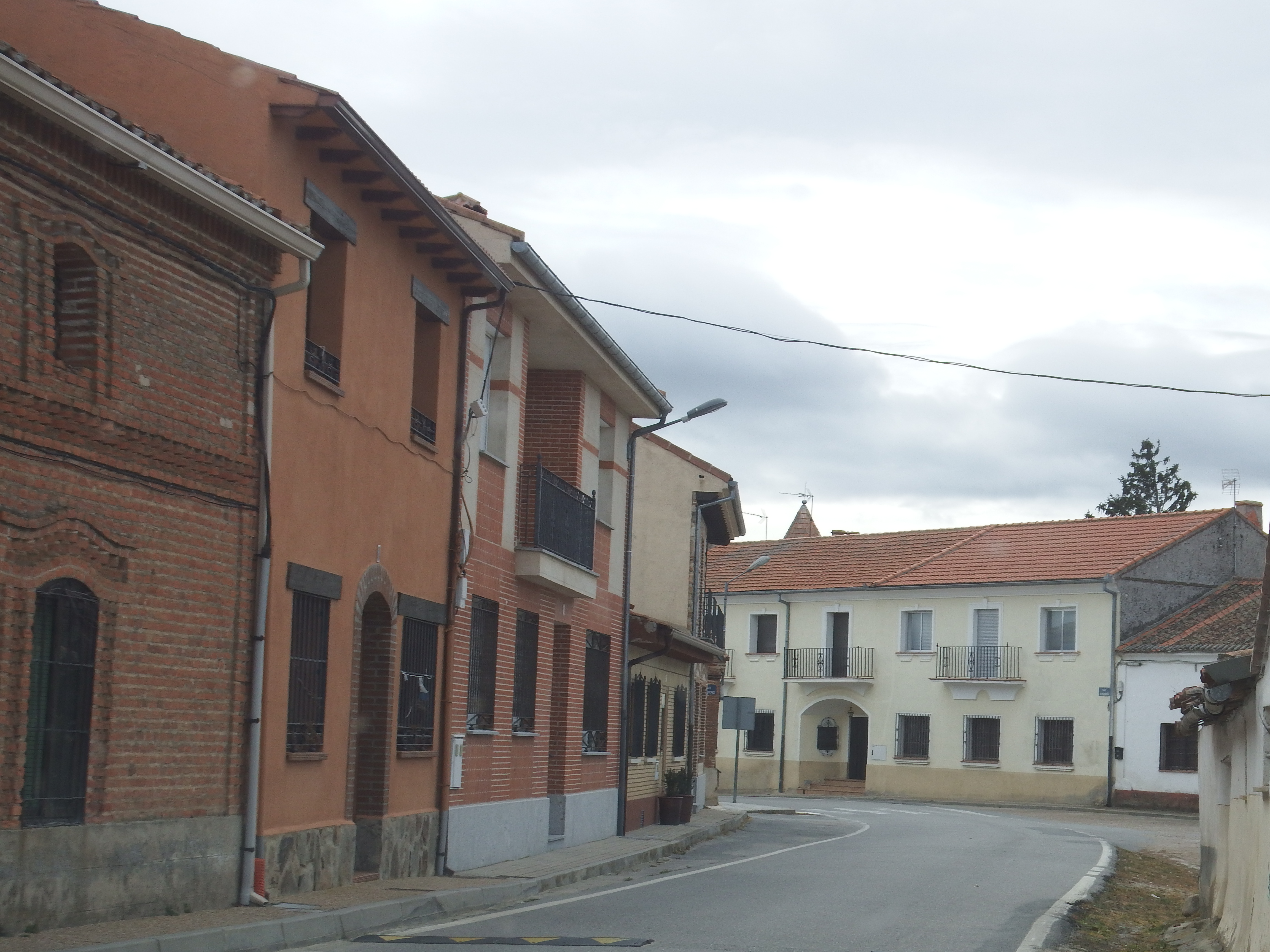 Bercial